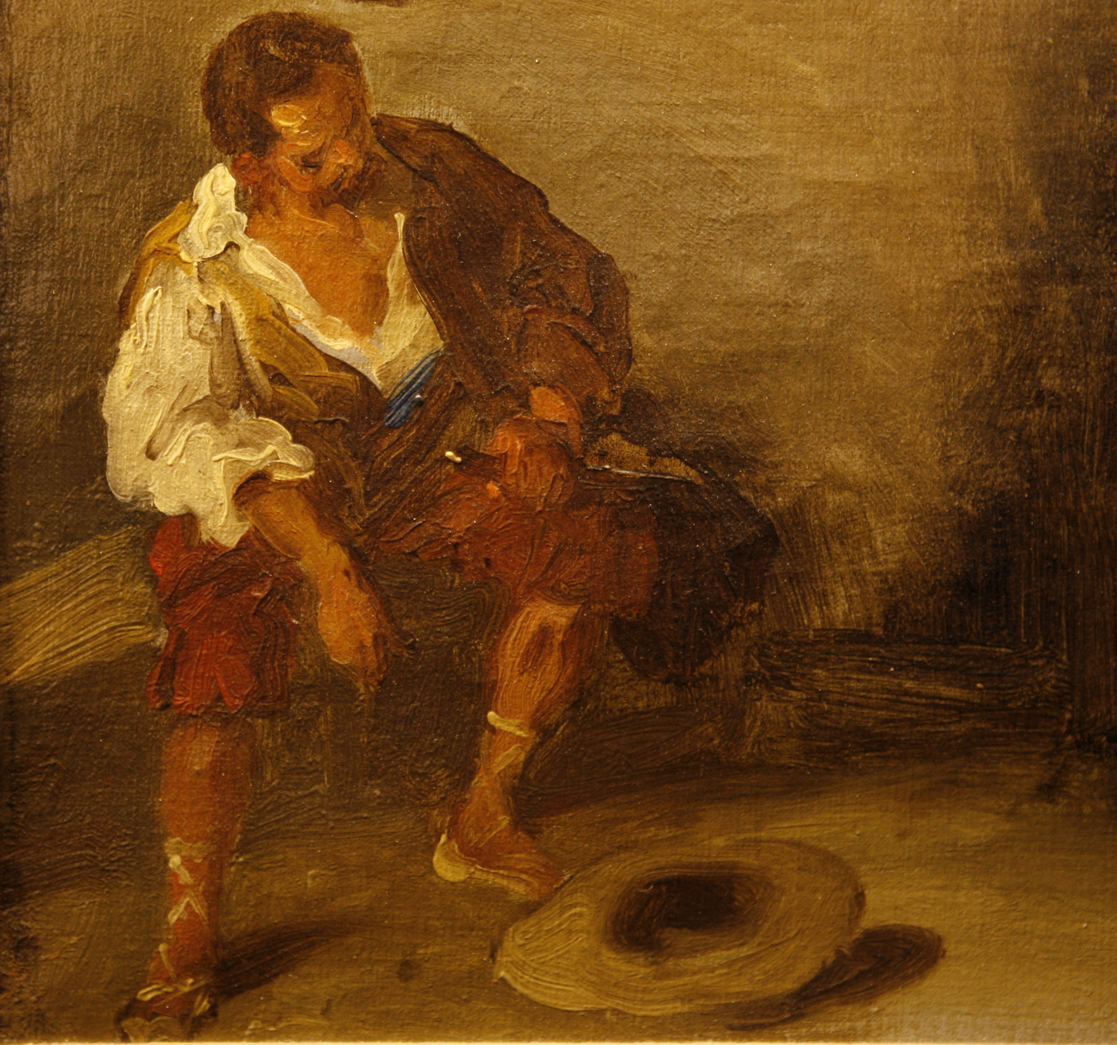 detail: Hernani - Source : Madeleine Blondel, Pierre Georgel, Victor Hugo et les images: Colloque de Dijon, 19-20 octobre 1984, 1989, Ville de Dijon, p. 35